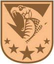 GCP 11